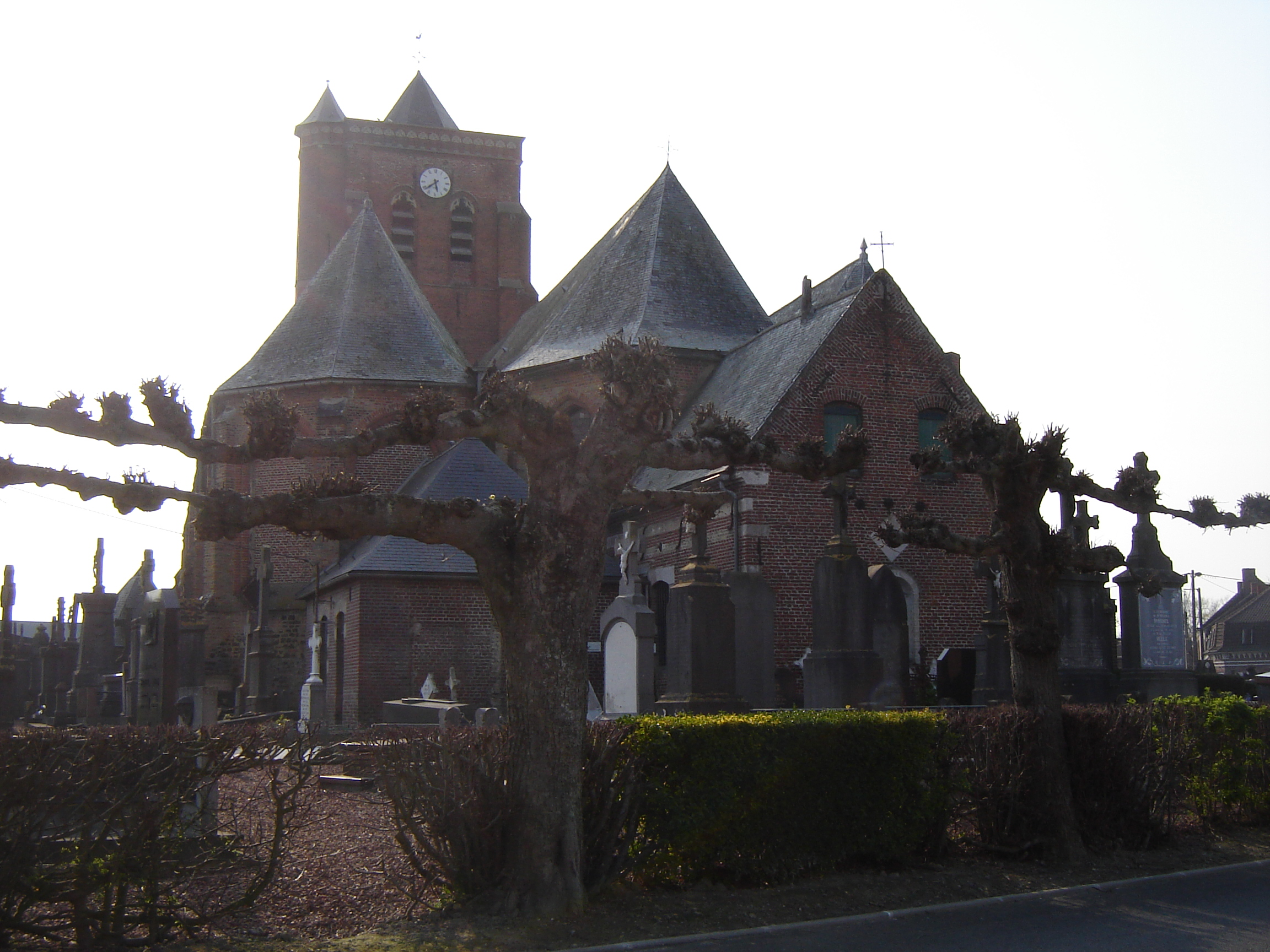 Eglise Saint-Martin in Arnèke, Nord, Nord-Pas-de-Calais, France